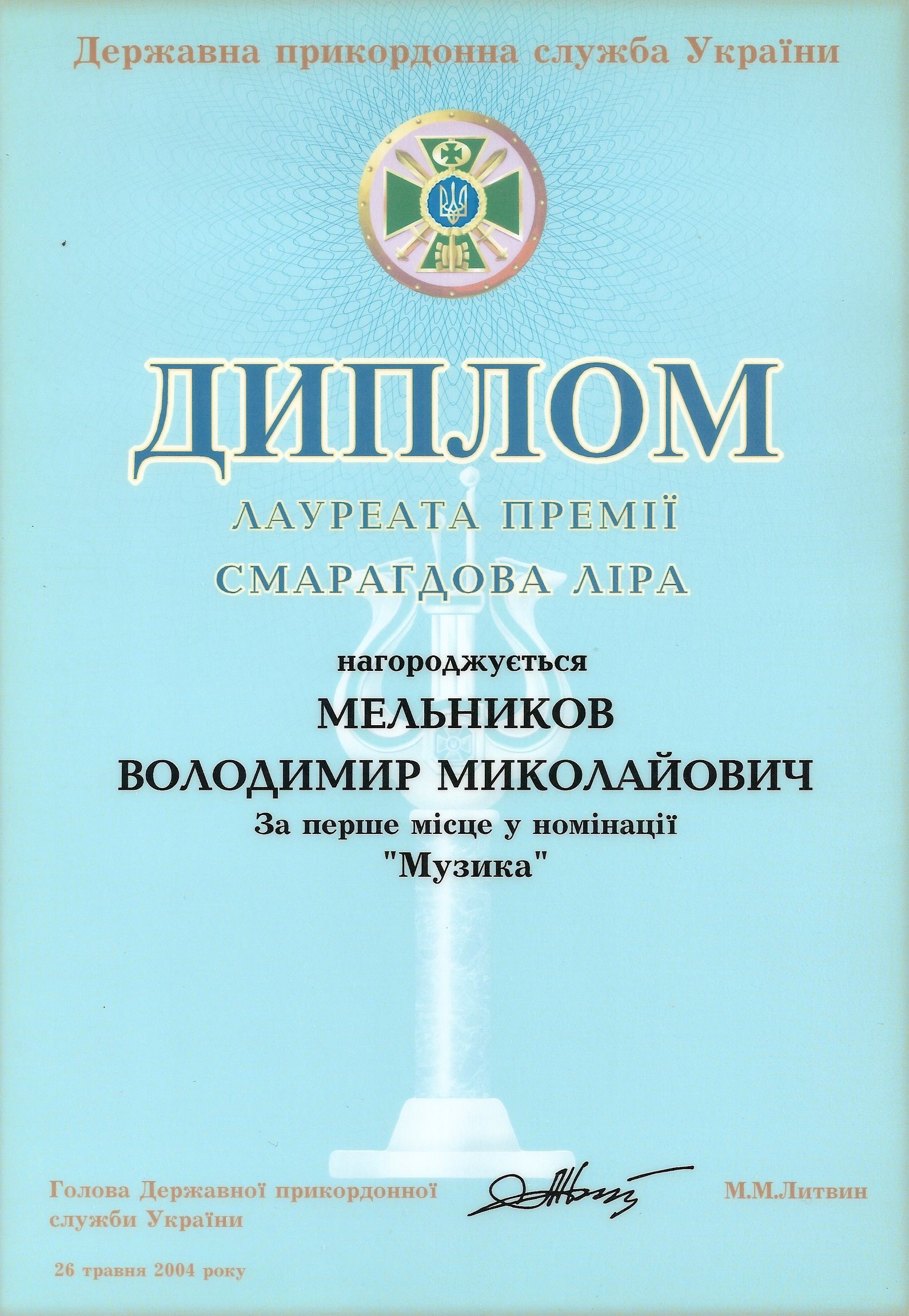 Диплом лауреата премії "Смарагдова ліра" за перше місце у номінації "Музика", яким було нагороджено Мельникова Володимира Миколайовича 26.05.2004 року.